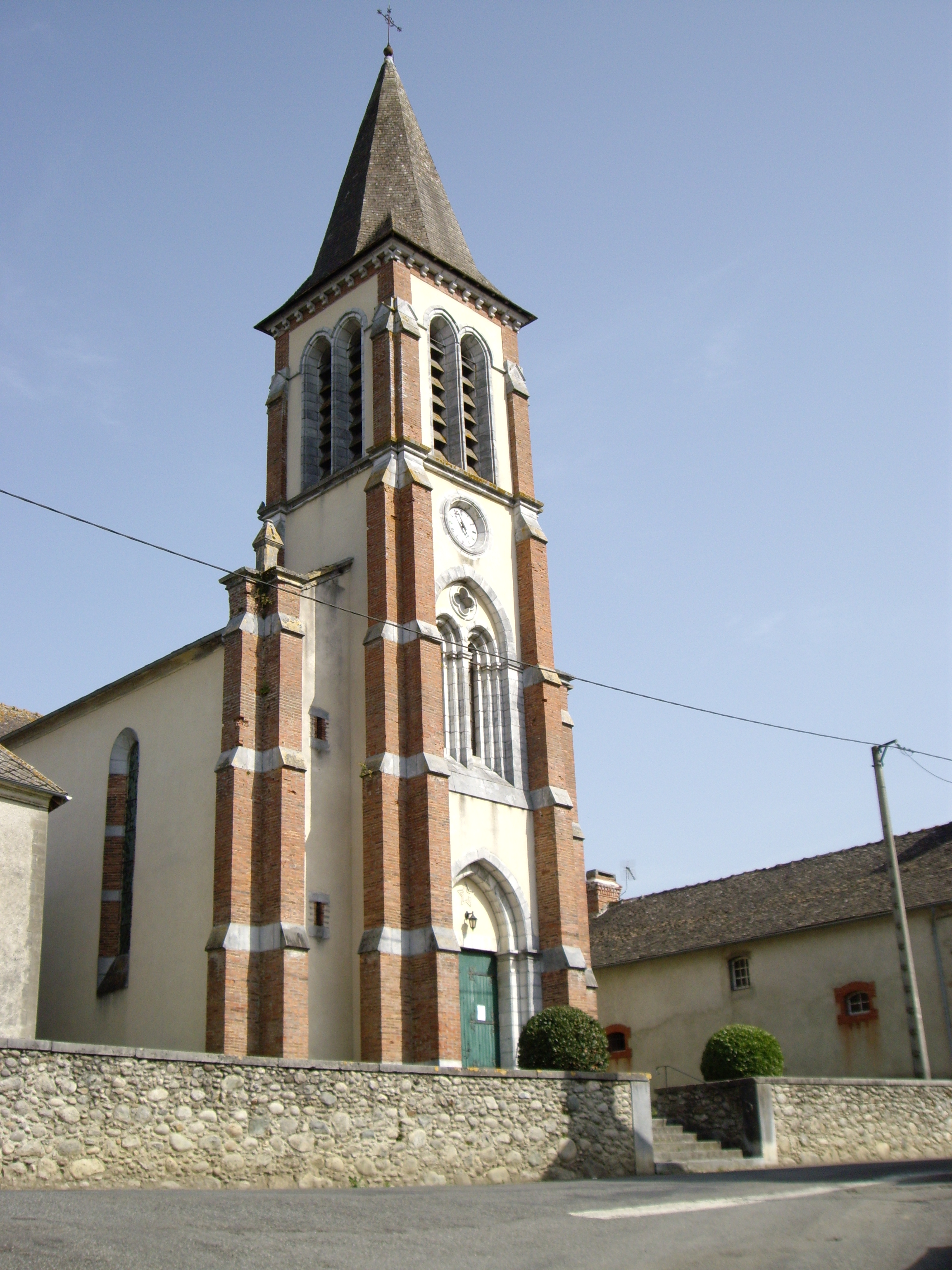 Église Saint-Vincent d'Orincles (65)